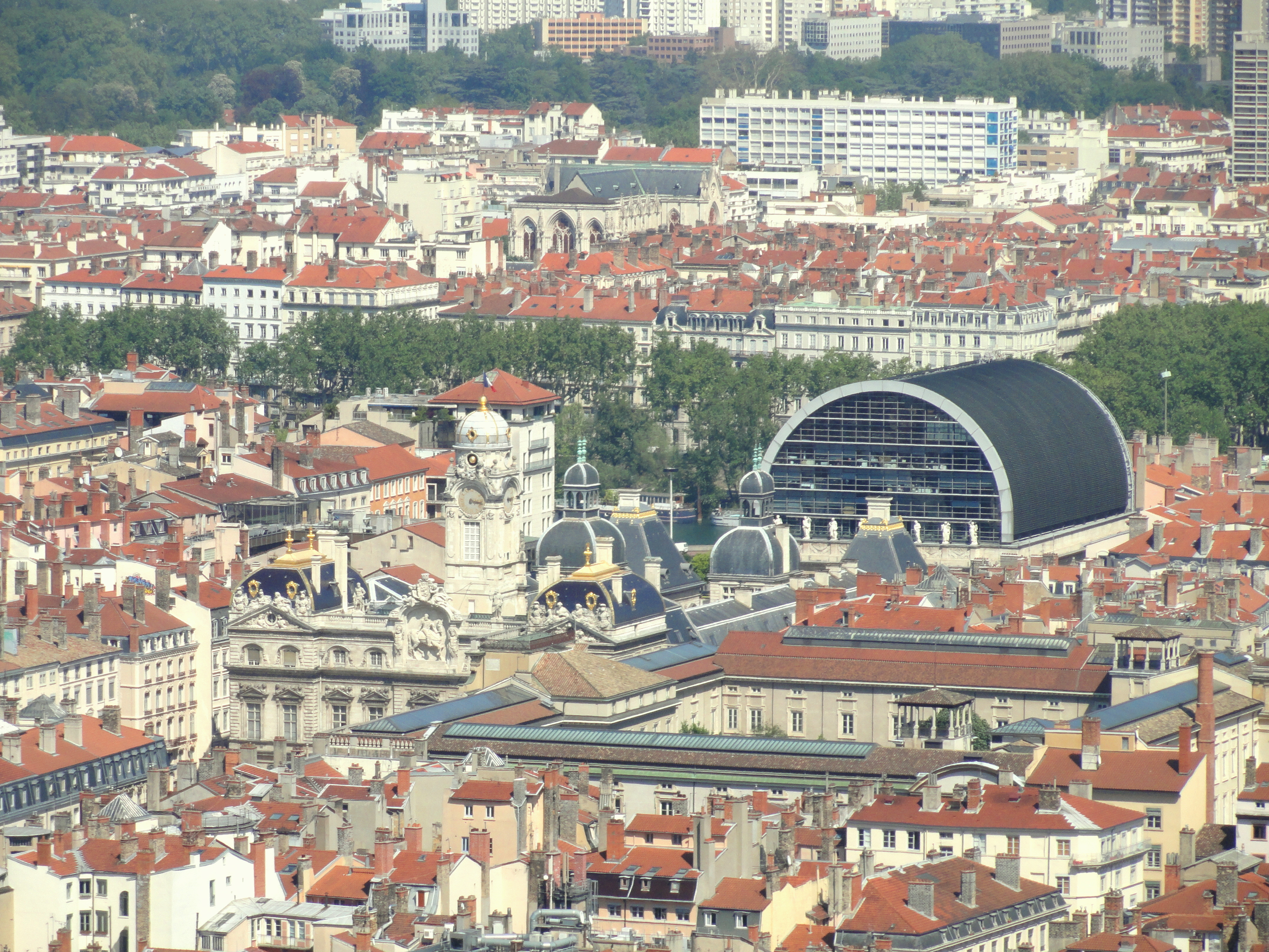 Opéra de Lyon, Lyon, France.